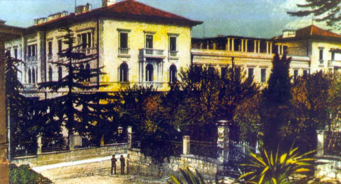 Pula, ca 1901. Old postcard.